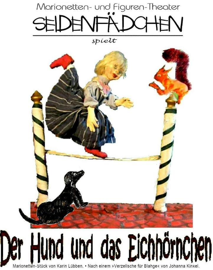 „Der Hund und das Eichhörnchen“ – Marionettenstück von Karin Lübben nach einem „Verzellsche für Blahge“ von Johanna Kinkel. (Poster / Flyer ab September 2011.)[1]